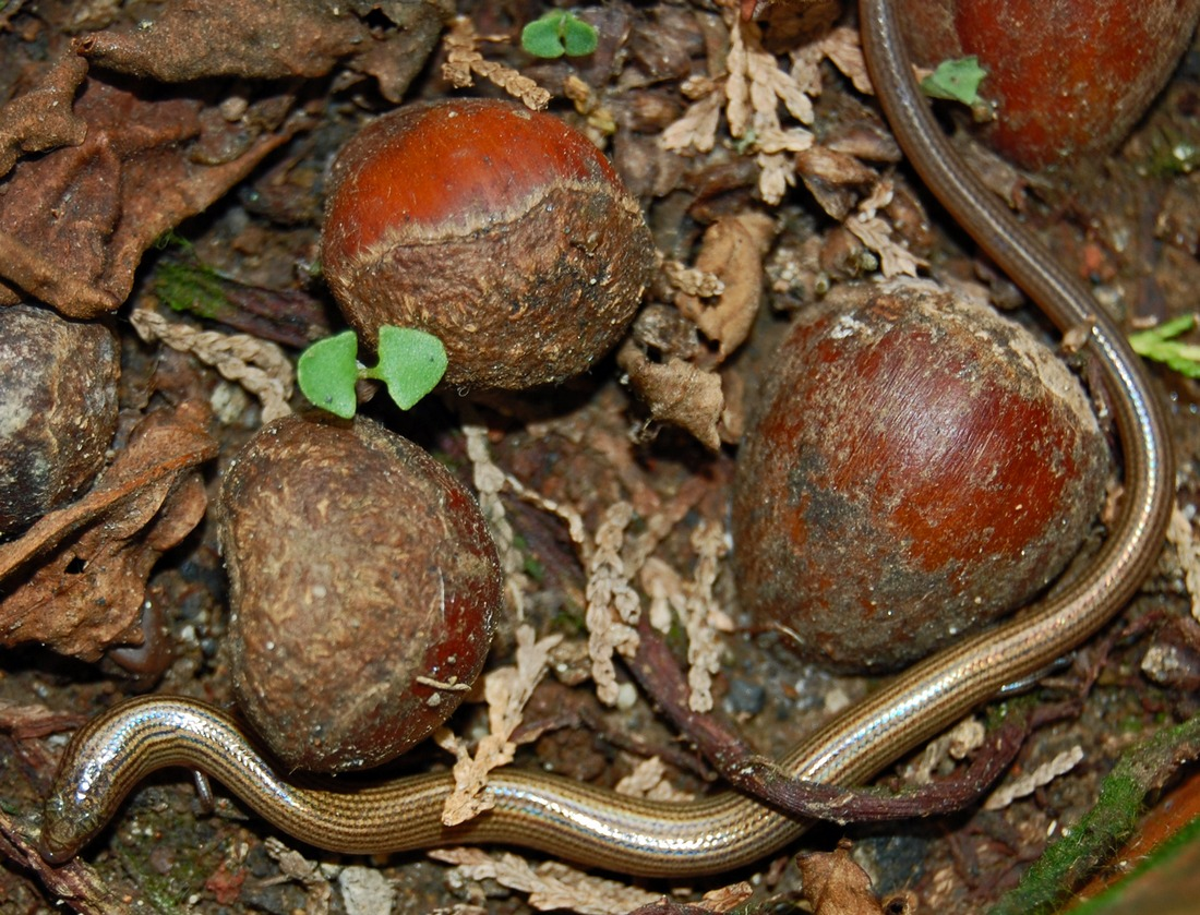 Lygosoma quadrupes. From Darmaga, Bogor, West Java, Indonesia